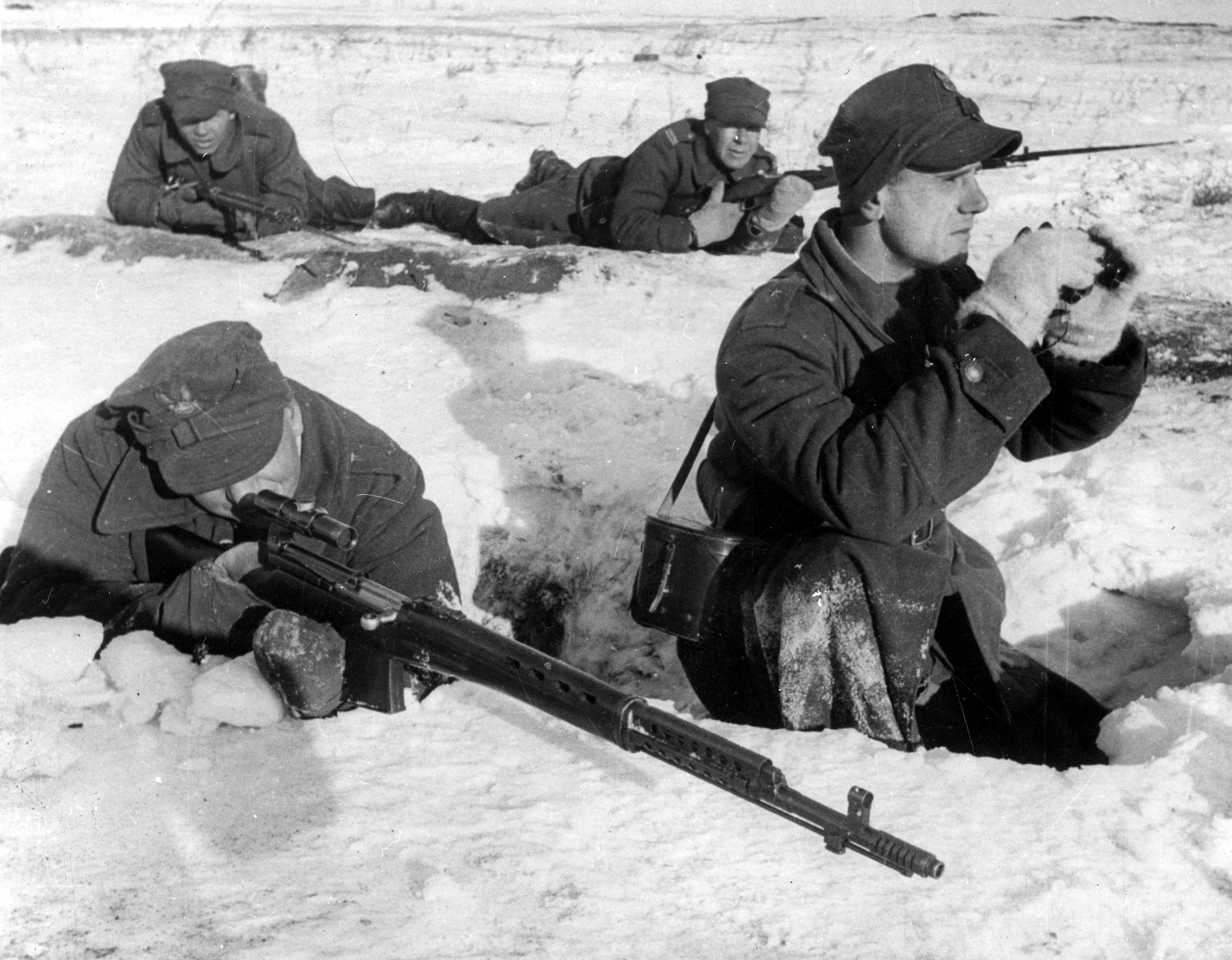 Na pierwszym planie żołnierz z karabinem SWT-40 wyposażonym w celownik optyczny PU. Obok obserwator z lornetką. W tle żołnierze z karabinkami Mosin wz. 38.